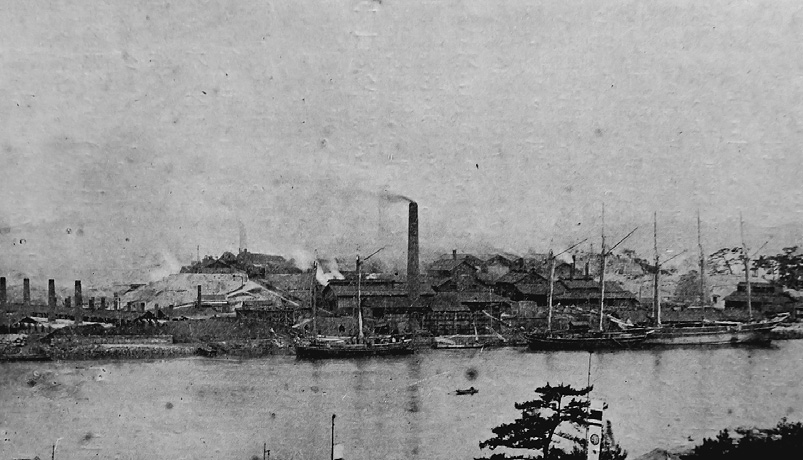 杉謙二編『岡山県名鑑』(明治44年8月発行)より往時の犬島精錬所の写真。